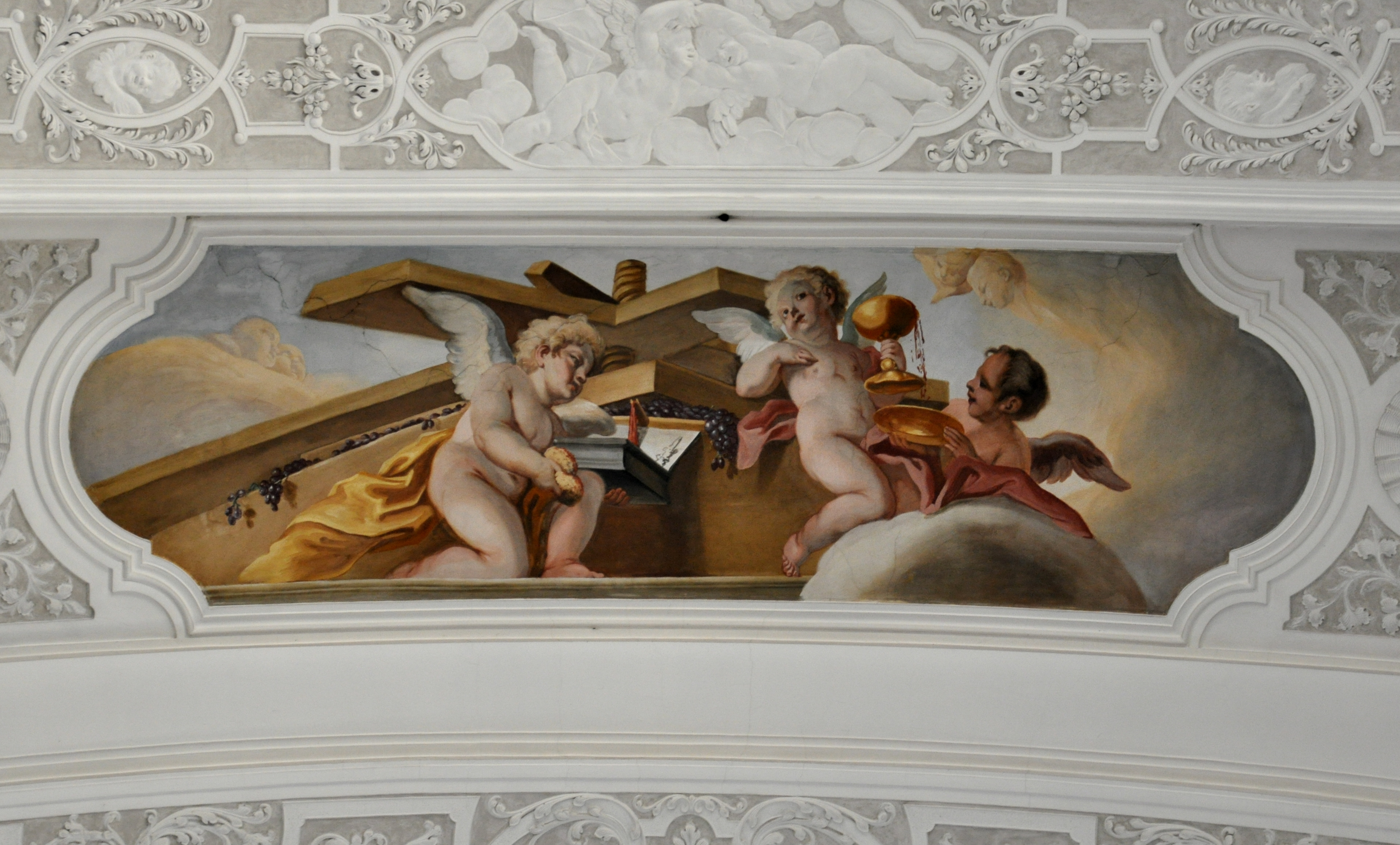 Weingarten (Württemberg) , Basilika St. Martin und Oswald, Fresken von Cosmas Damian Asam, 1718–1720 Fresken im nördlichen Querschiff zum Thema "Heilig Blut": Engelchen mit einer Kelter (bezugnehmend auf die "mystische Kelter")